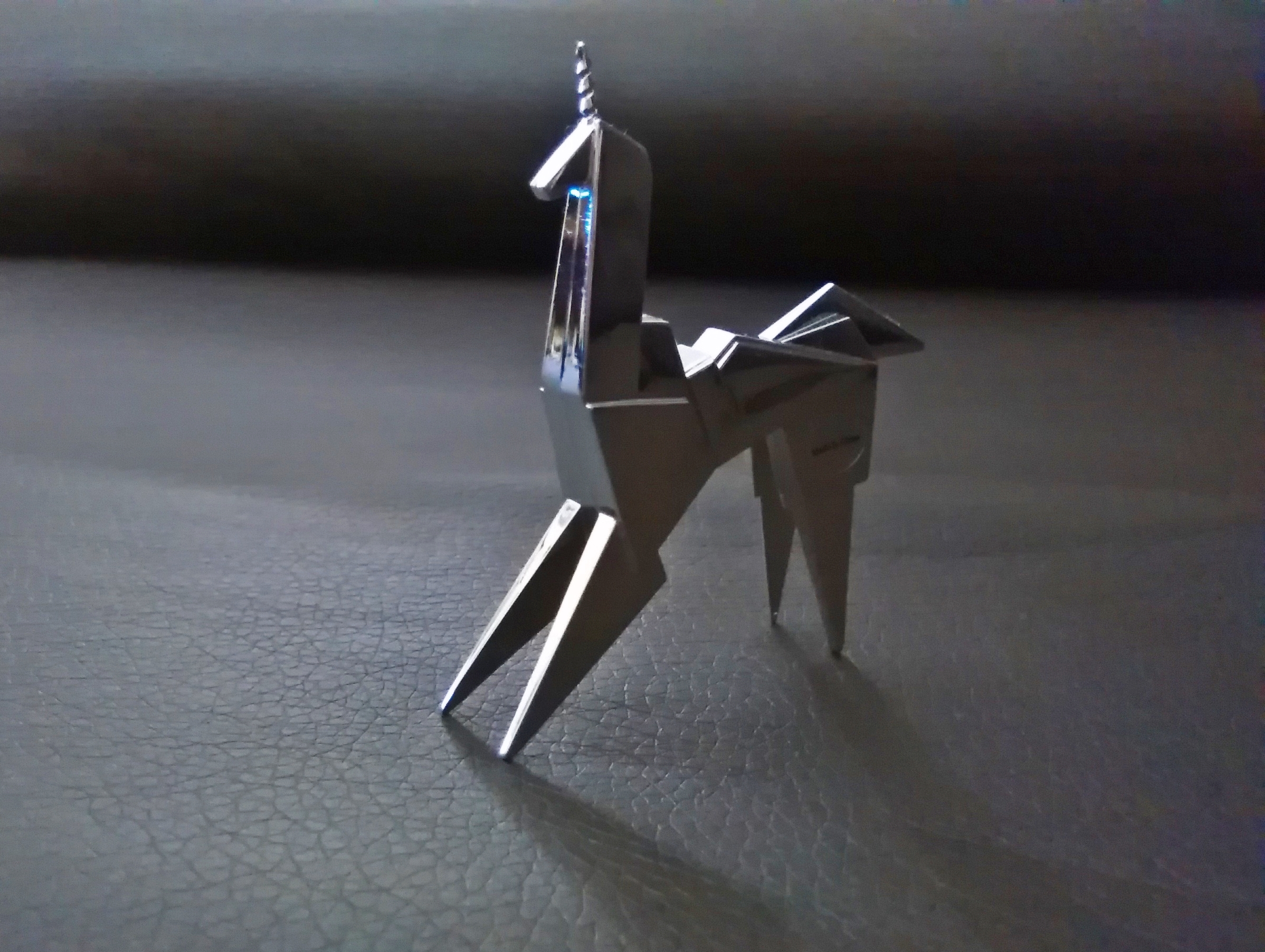 Unicornio incluido en el maletín de la Five-Disc Ultimate Collector's Edition de Blade Runner.